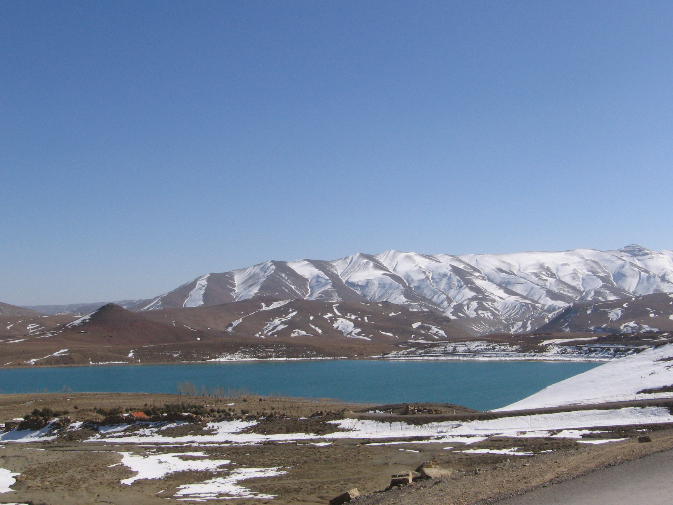 lac d'Imilchil dans le haut Atlas marocain, lieu de rassemblement des tribus Aït Haddidou, lors du moussem de septembre.